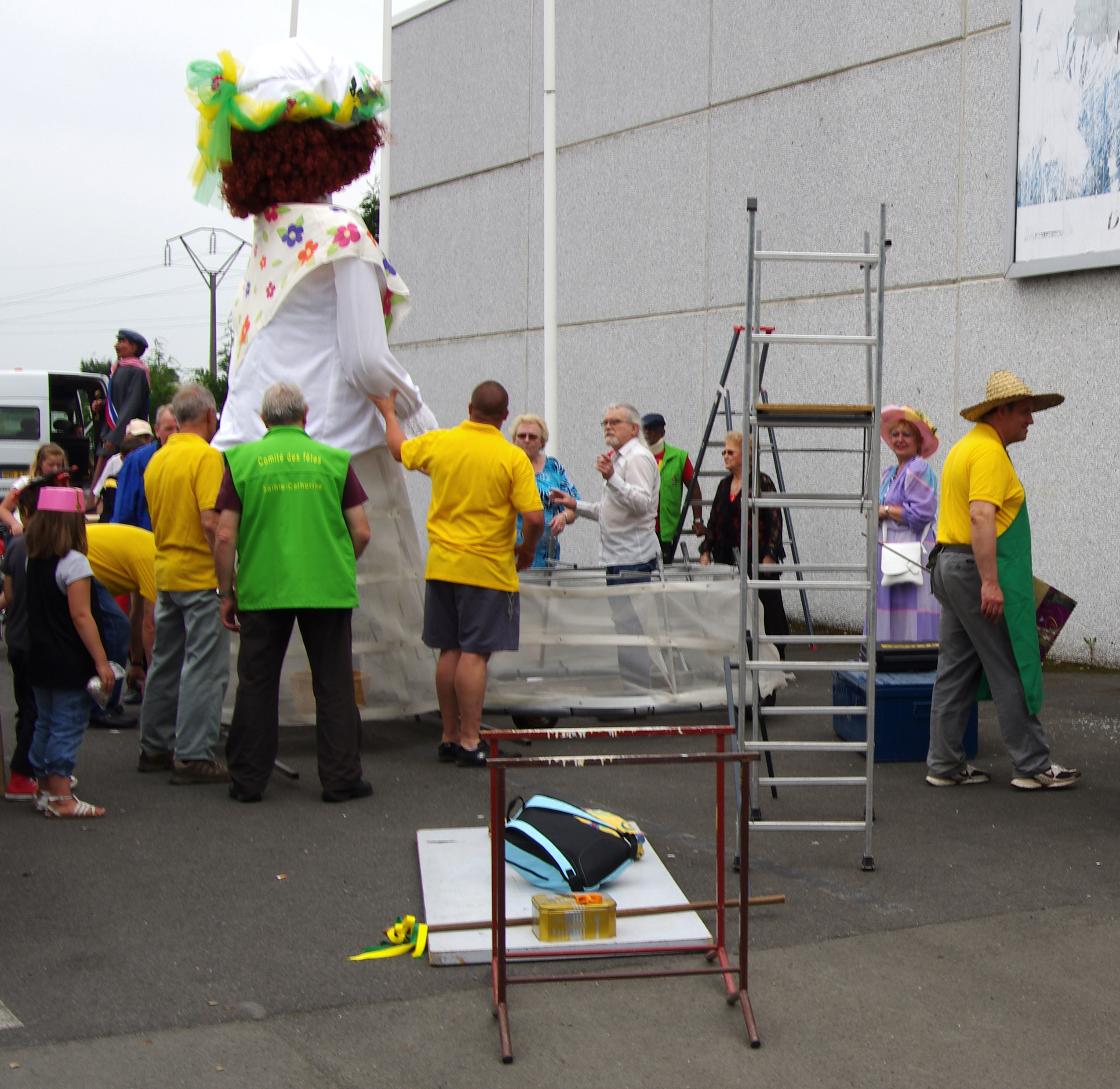 Sainte-Catherine-lès-Arras (Pas-de-Calais, France) - Animation festive avec défilé de géants, un dimanche de juin. Le départ du parcours est prévu route de Béthune, depuis le parking du supermarché "Intermarché". Les accompagnateurs de Dame Catherine terminent l'assemblage et l'habillage de leur géant. On remarque en particulier des tréteaux et une échelle. A l'arrière-plan, se dresse un autre géant ("Tiot Mitt"). .